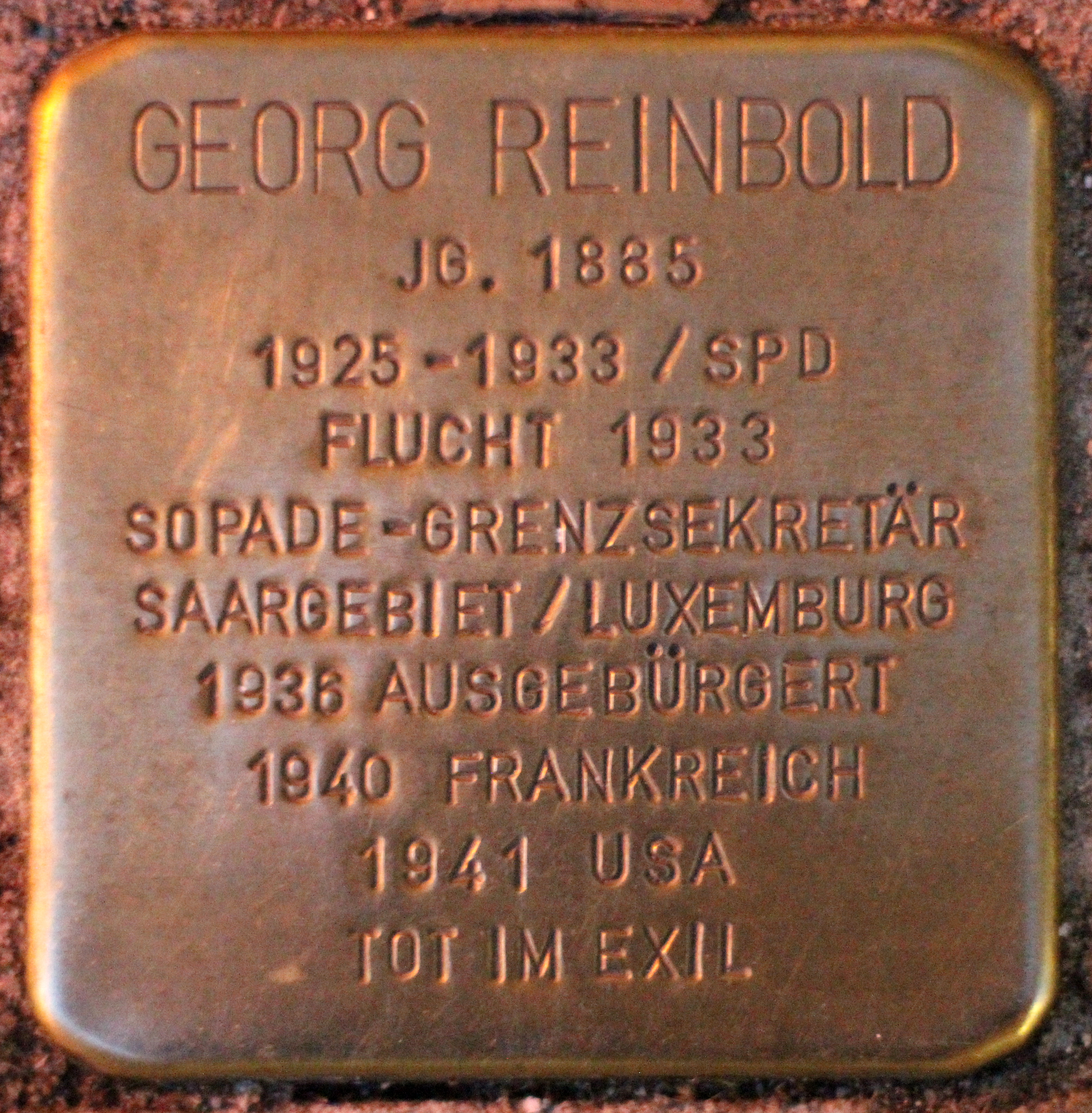 Bildinhalt: Stolperstein Ständehausstraße 2 Aufnahmeort: Karlsruhe, Deutschland